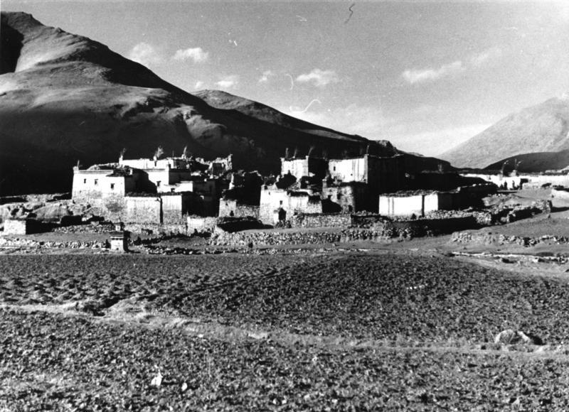 Kangmar, Ortschaft